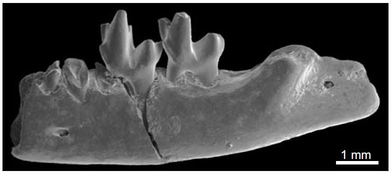 Buccal view of DPC 23783B, a left mandibular fragment of the afrosoricid placental Dilambdogale gheerbranti gen. et sp. nov., from the earliest late Eocene (earliest Priabonian) locality BQ−2, Birket Qarun Formation, Fayum Depression, northern Egypt, preserving m2–3.